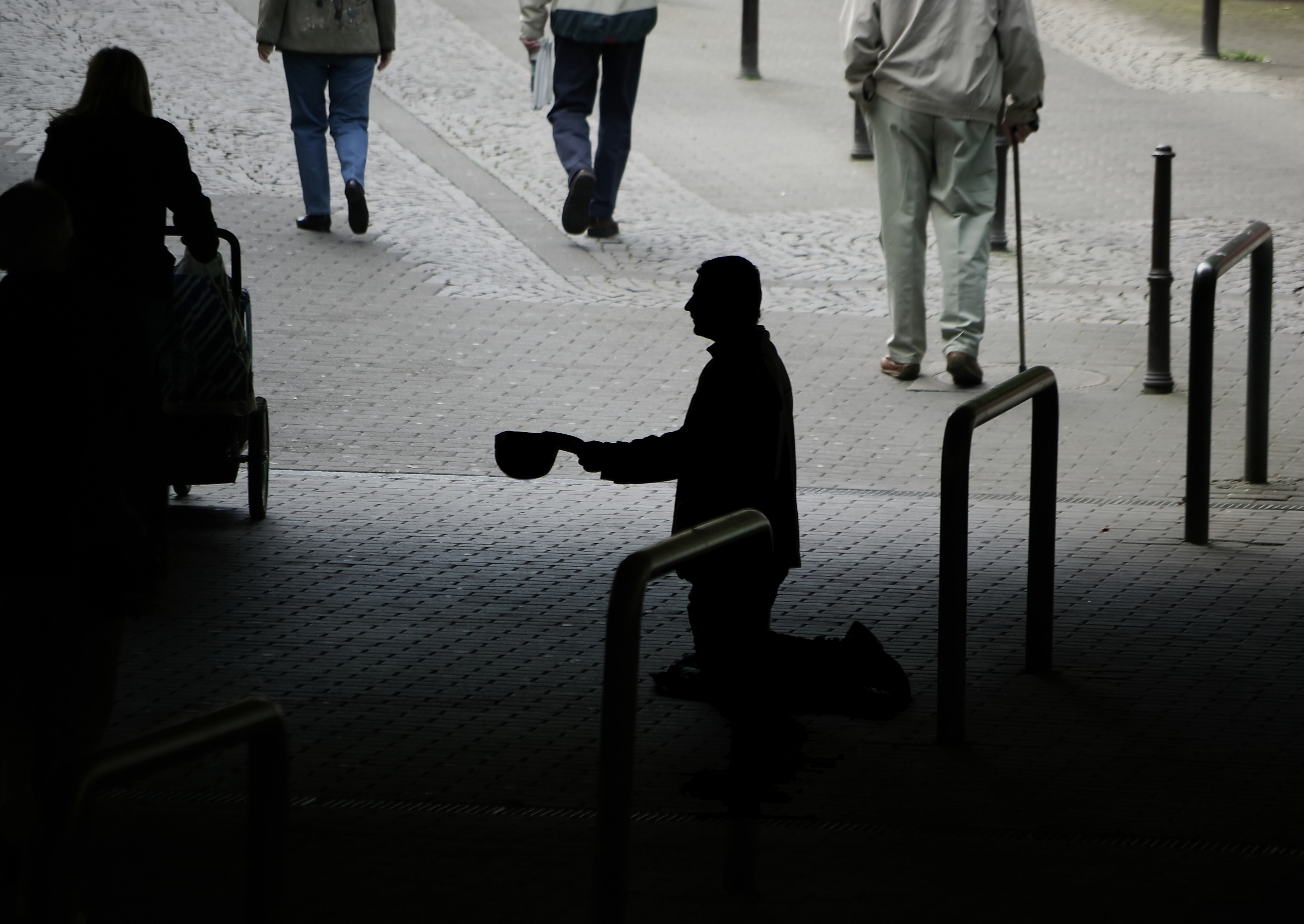 Bettler in Deutschland, Unterführung an der S-Bahnstation Unna